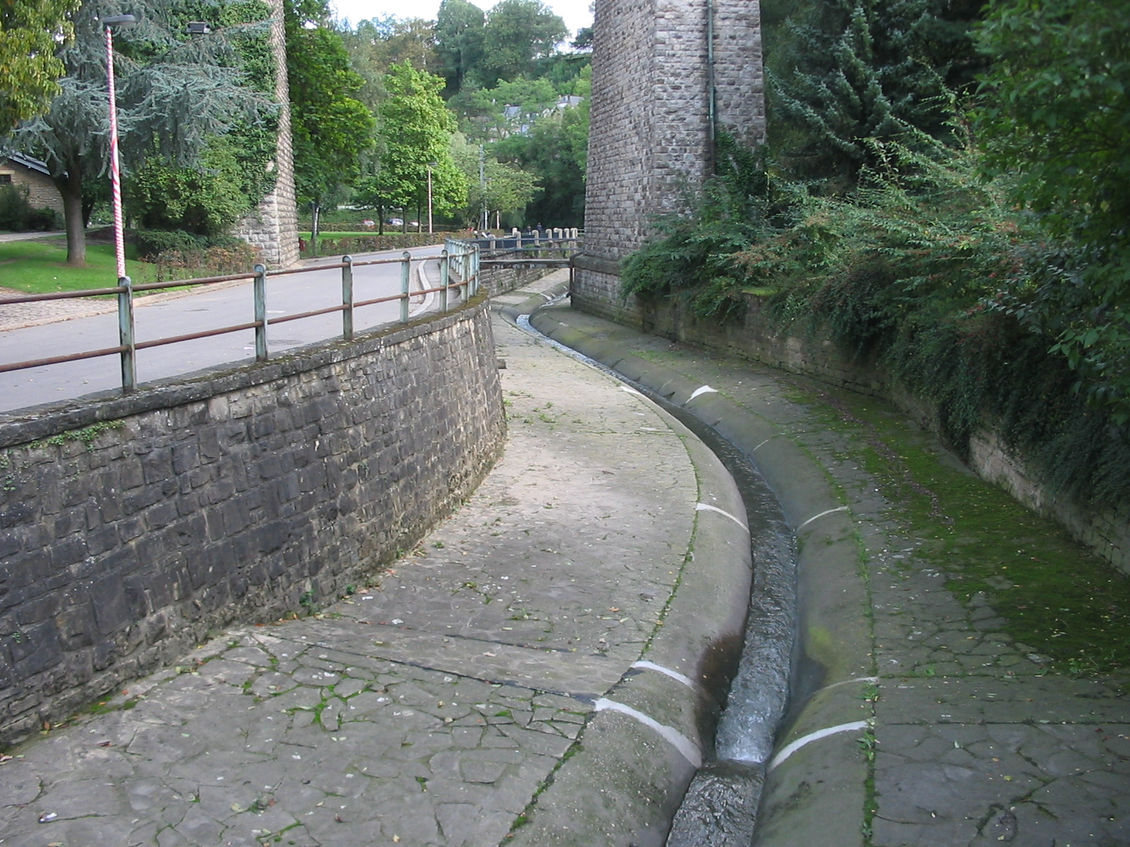 Die kanalisierte Pétrusse (siehe Petruss-Tal in Luxemburg (Stadt), unterhalb der Passerelle.